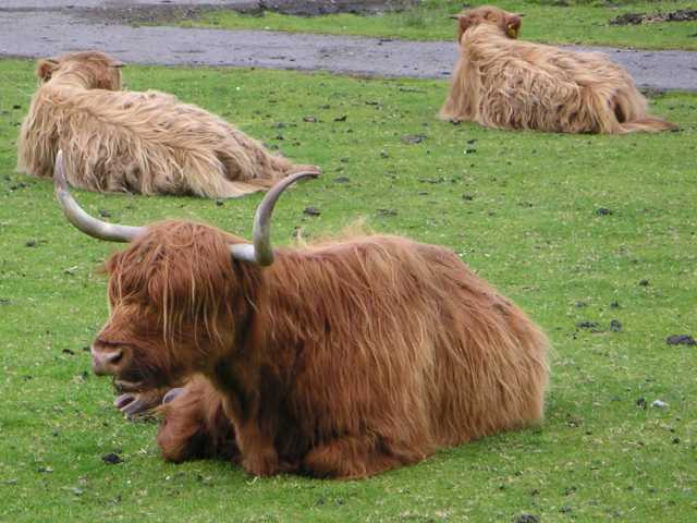 Bydło szkockiej rasy wyżynnej